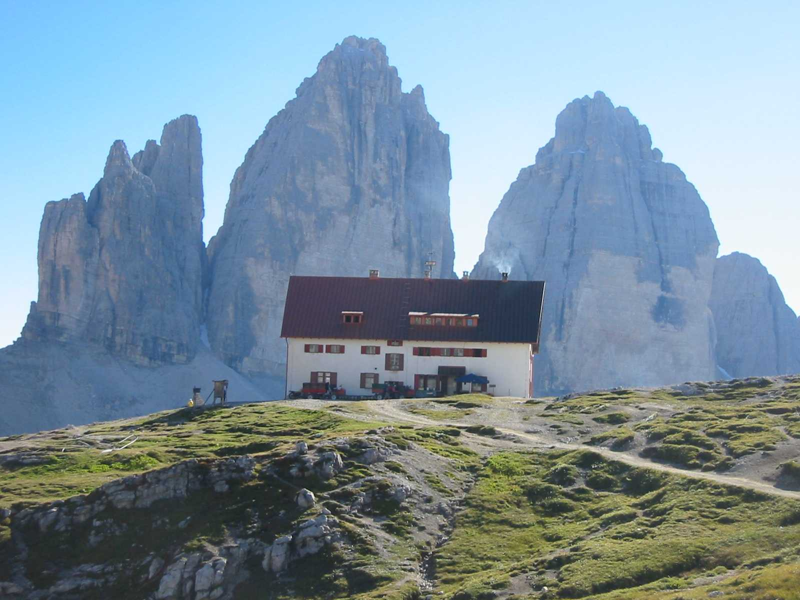 Drei Zinnen Hütte-Rifugion Locatelli